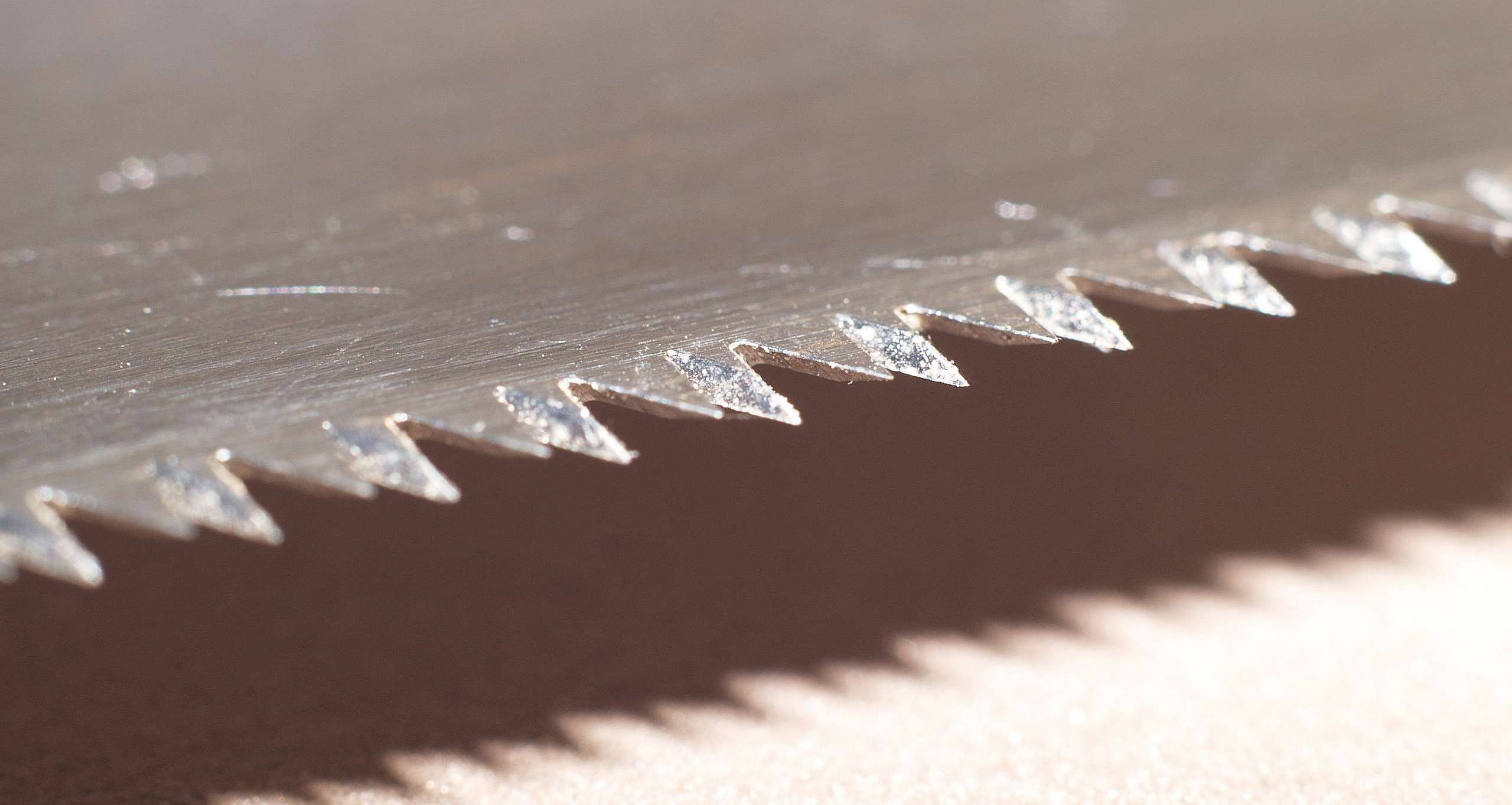 Kugihiki, Japanese saw, Dübelsäge